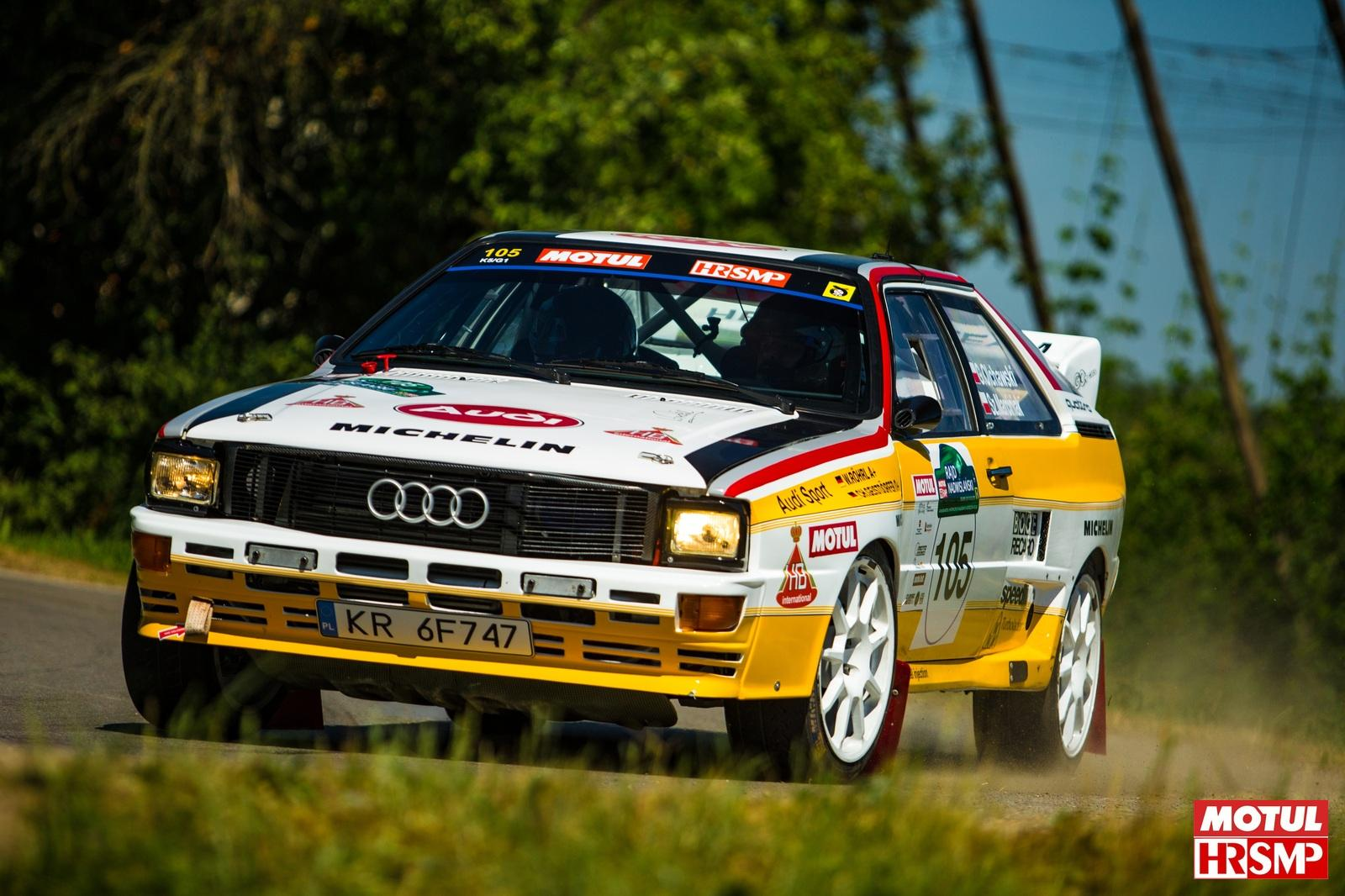 Grzegorz Olchawski - Audi Quattro Coupe Rajd Nadwiślański HRSMP 2018